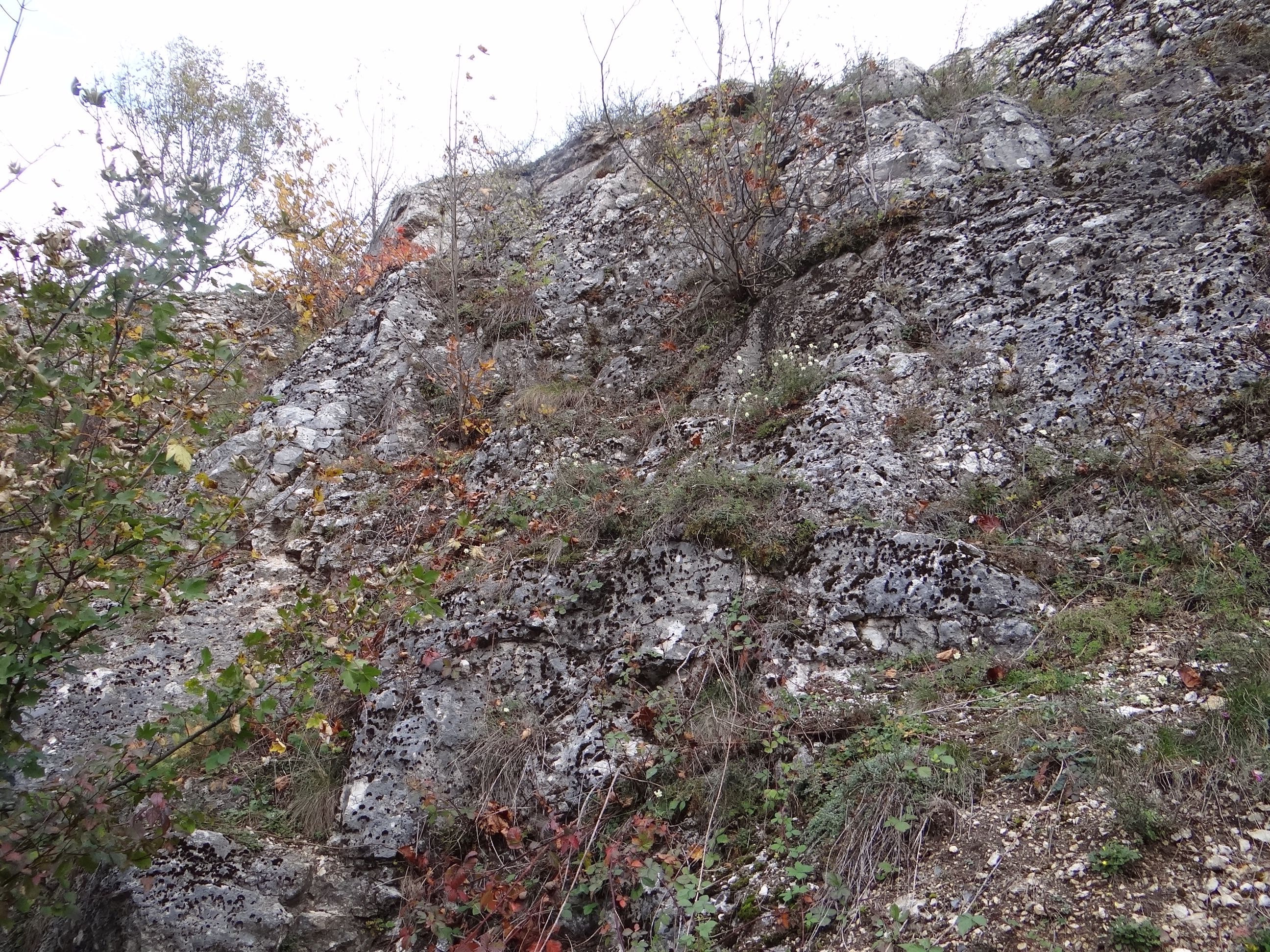 Łom Bergera na Księżej Górze w Pychowicach (Kraków)